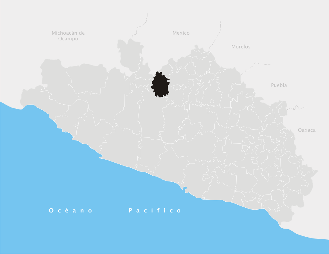 Arcelia en el estado de Guerrero (México)